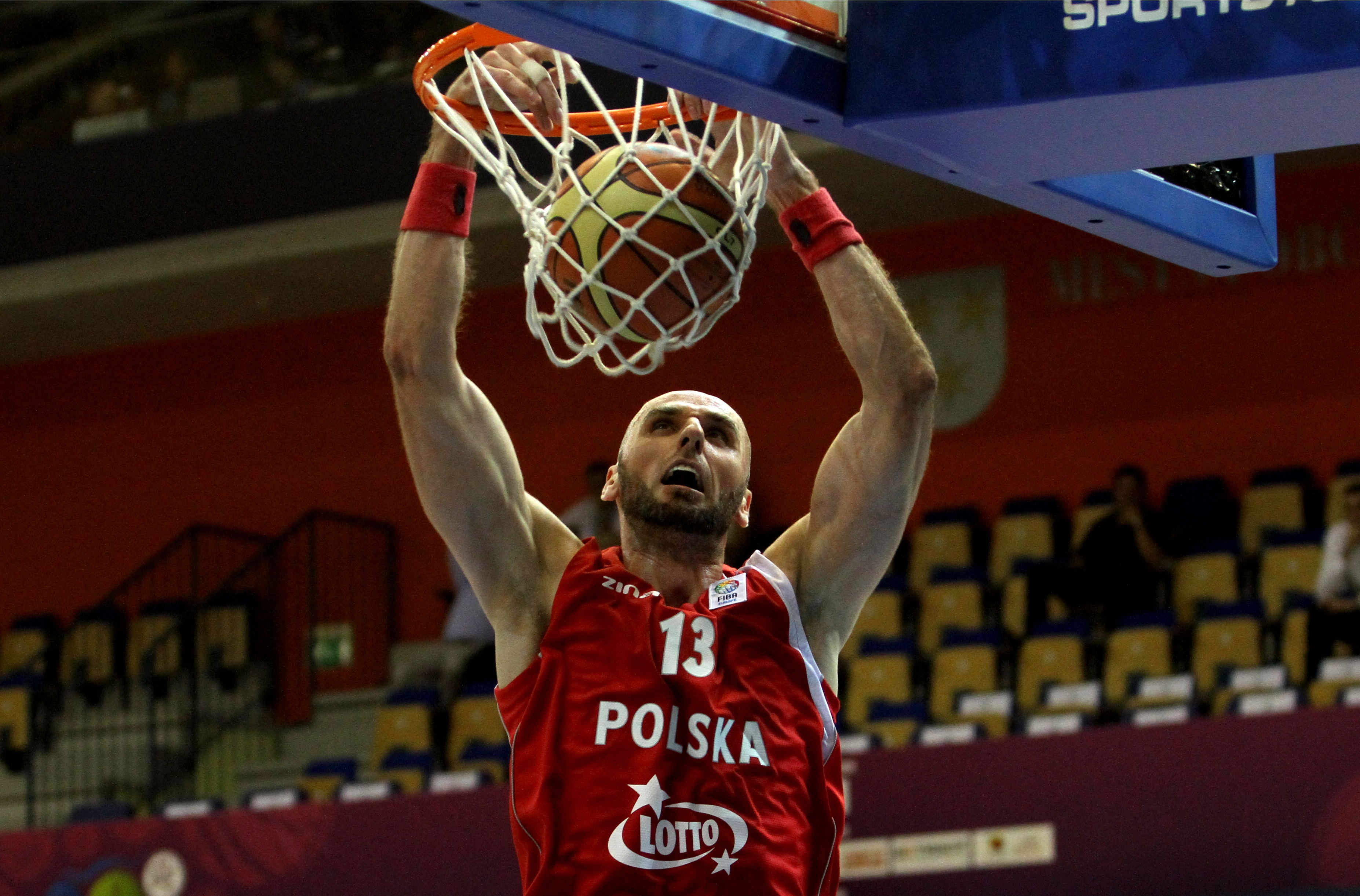 Reprezentacja Polski koszykarzy z 2013 roku. Marcin Gortat